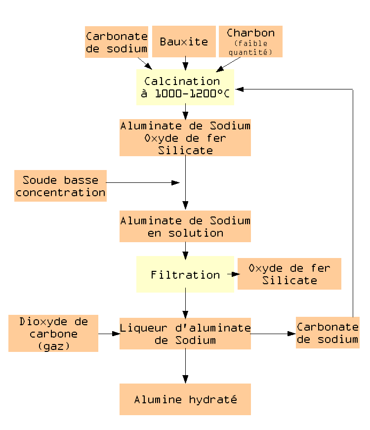 extraction de l'alumine par le procédé Deville Péchiney